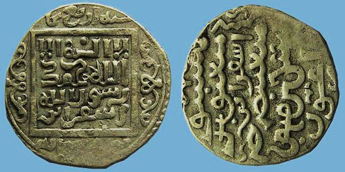 ین سکه در زمان ارغون از پادشاهان ایلخانی در اسفراین ضرب گردیده است روی سکه: خاقانو/ ارابم/ اسفراین / ارغونون /دلدک گولوک /ارغون پشت سکه: لا اله الا/ الله محمد/ رسول الله / اسفراین / حاشیه: سنه اربع ثمانین وستمائة که این سکه و سکه های دیگر که به وضوح واژه اسفراین یه دستور حکومت مرکزی در روی آن ضرب گردیده مهر تاییدی بر نام دیرینگی این شهر می باشد که بسیاری از مورخین وجغرافیدانان به دلیل عدم حضور از نزدیک و اتکا به گفته ها و نوشته ها دیگران به اشتباه گاه سبراین ، اسپرایین و....از آن یاد کرده اند